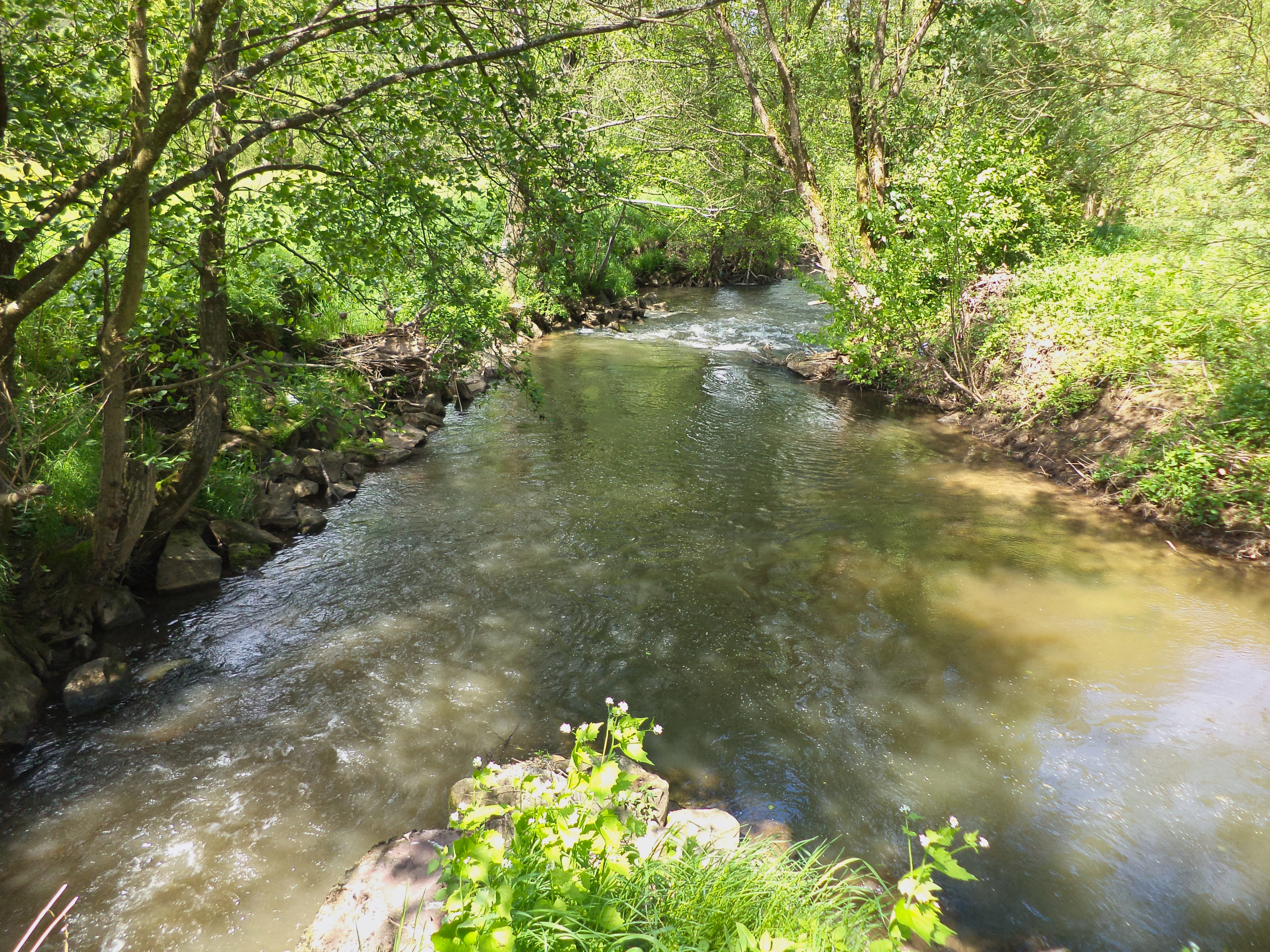 Der Reichenbach (vorne links) mündet in die Kahl (von vorne rechts nach hinten)